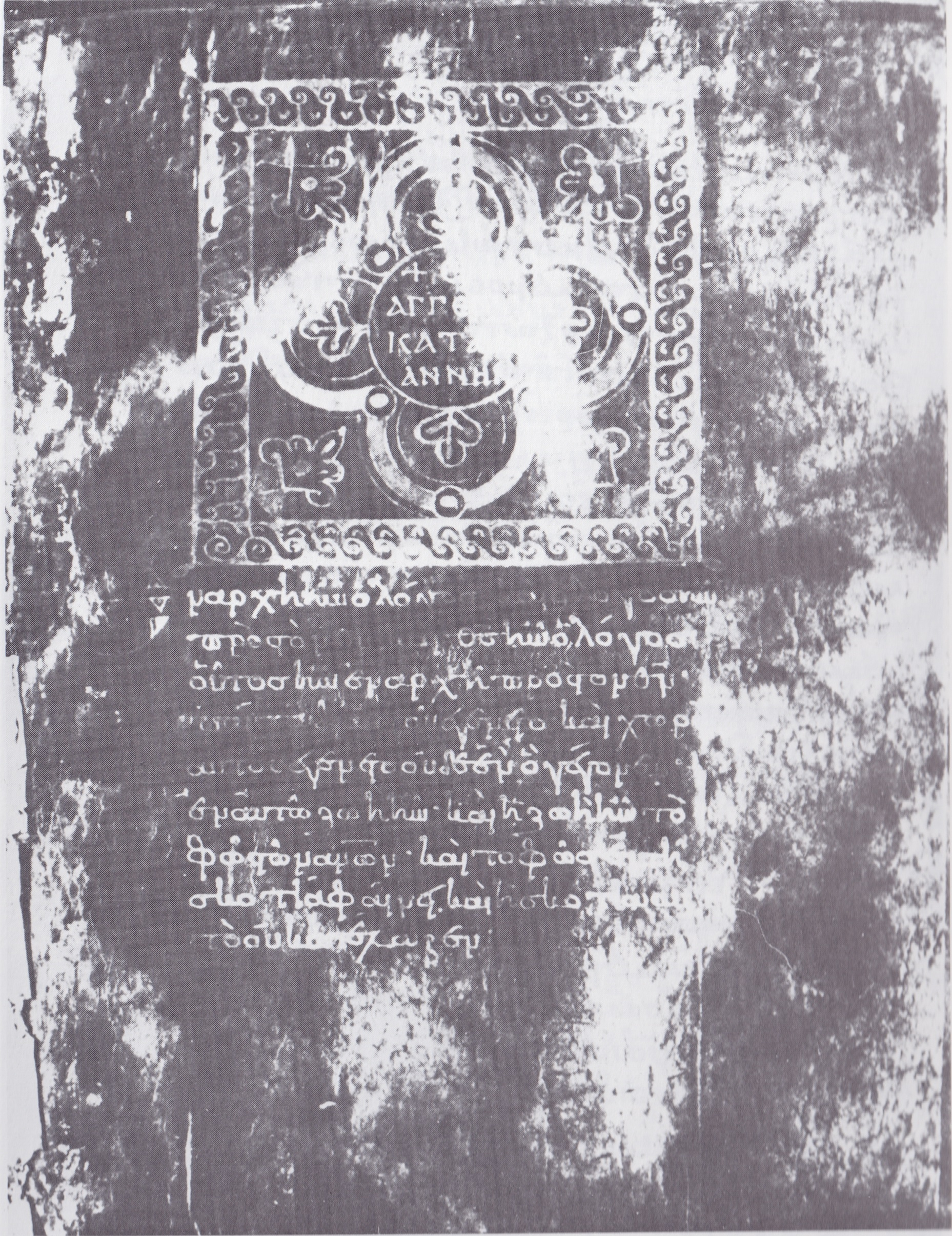 Minuscule 565 (Gregory-Aland)